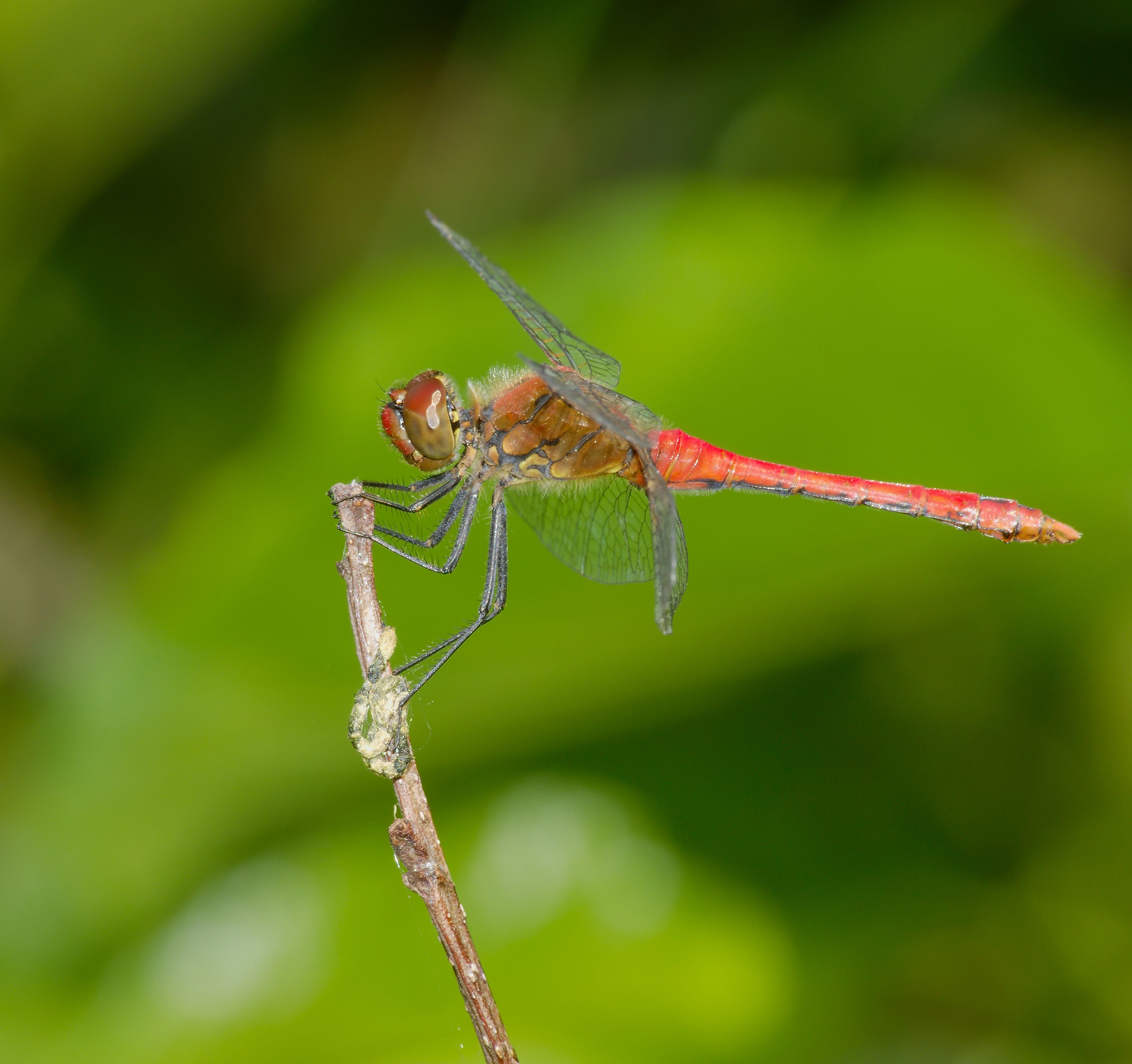 Blutrote Heidelibelle - Sympetrum sanguineum, Männchen. Aufgenommen in Wöllnau Winkelmühle, Doberschütz, Sachsen, Deutschland.